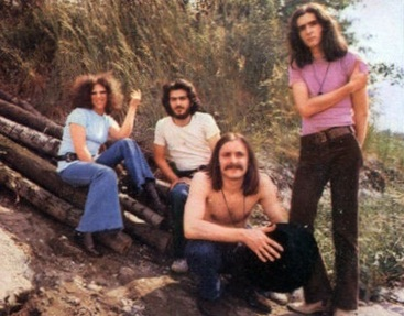 Il complesso prog Circus 2000